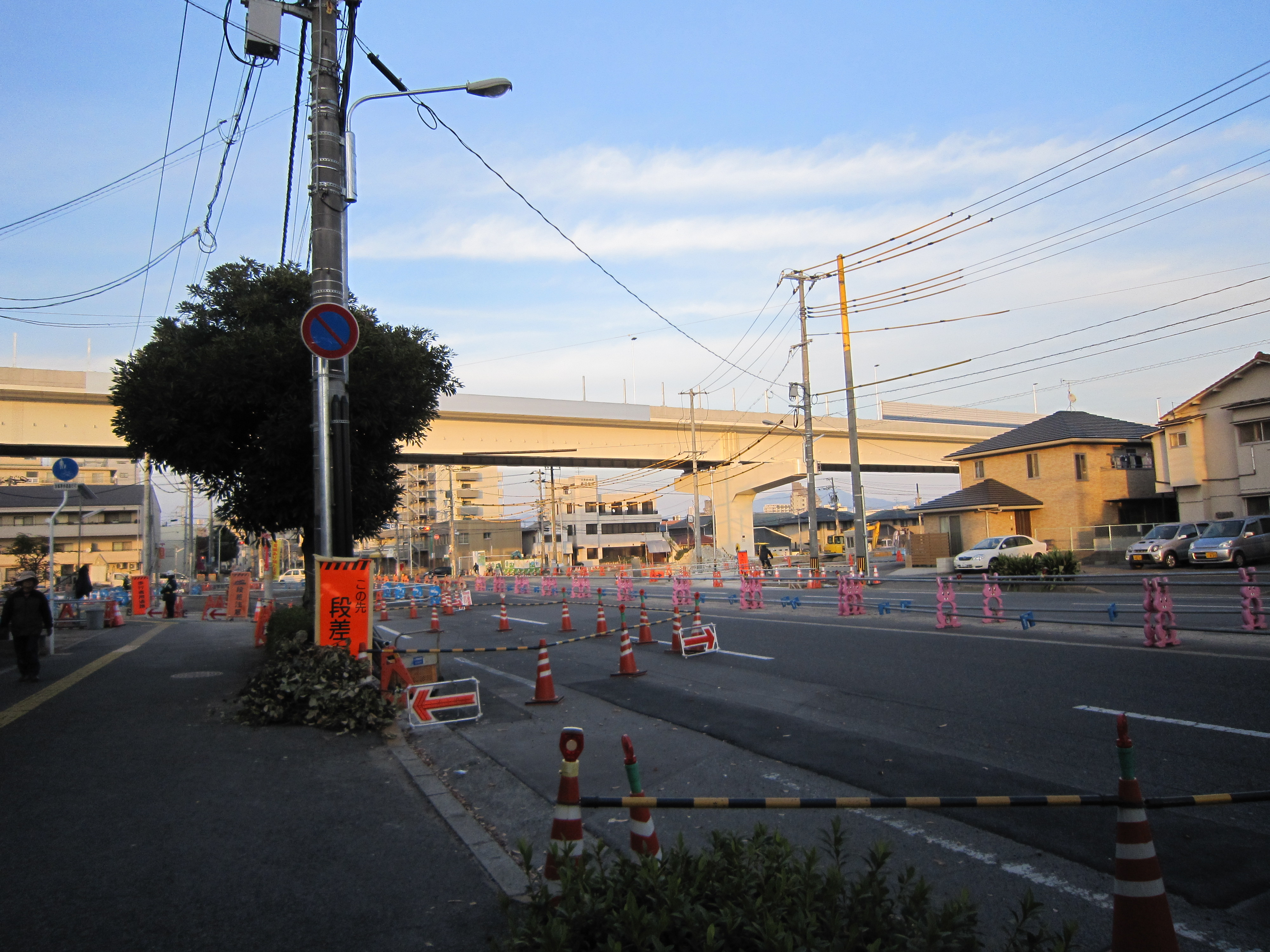 中区江波本町。広島市道横川江波線と広島南道路・広島高速３号線が交わる交差点。